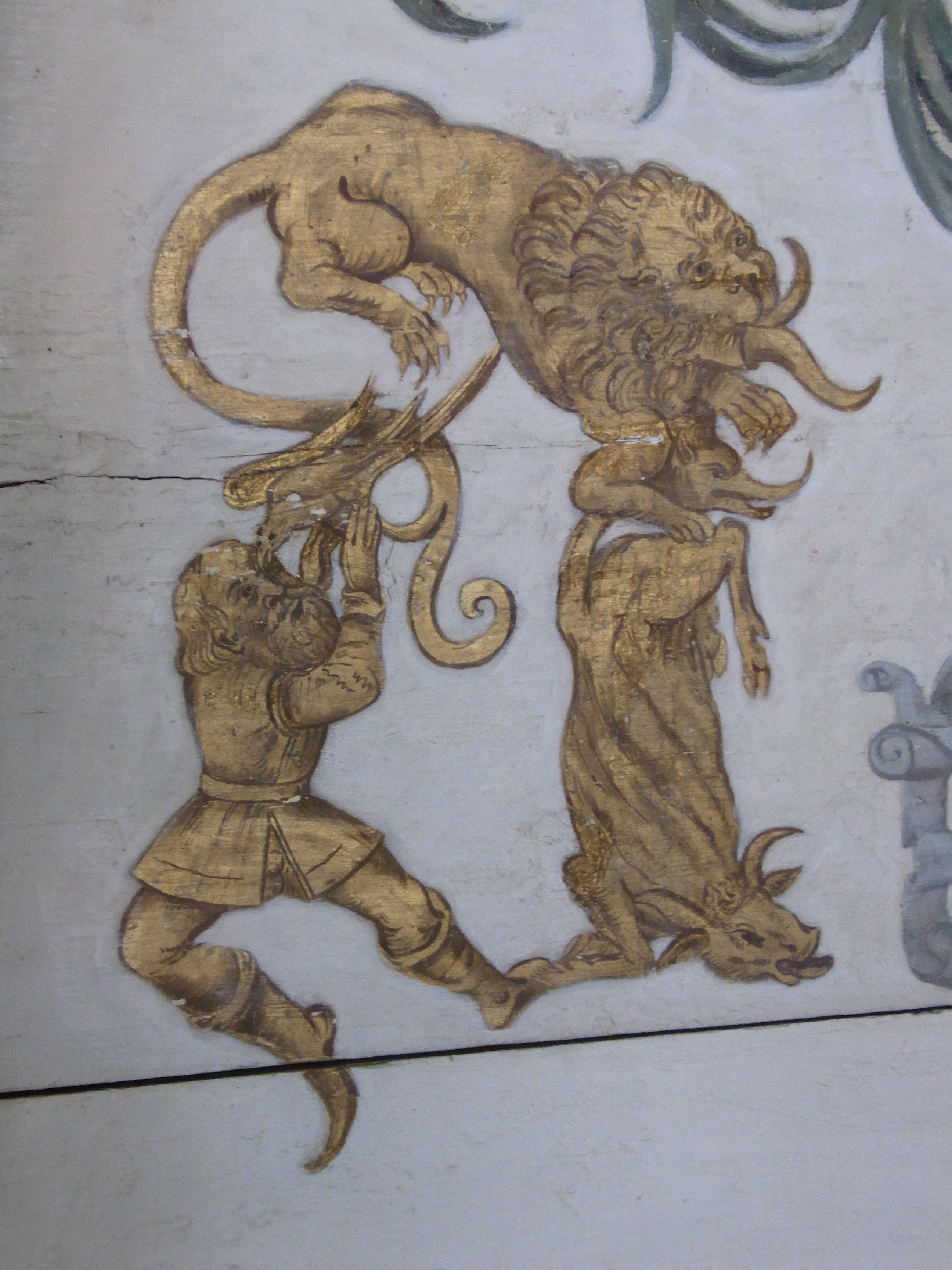 Bad Urach: Schloss Urach - Goldenes Zimmer